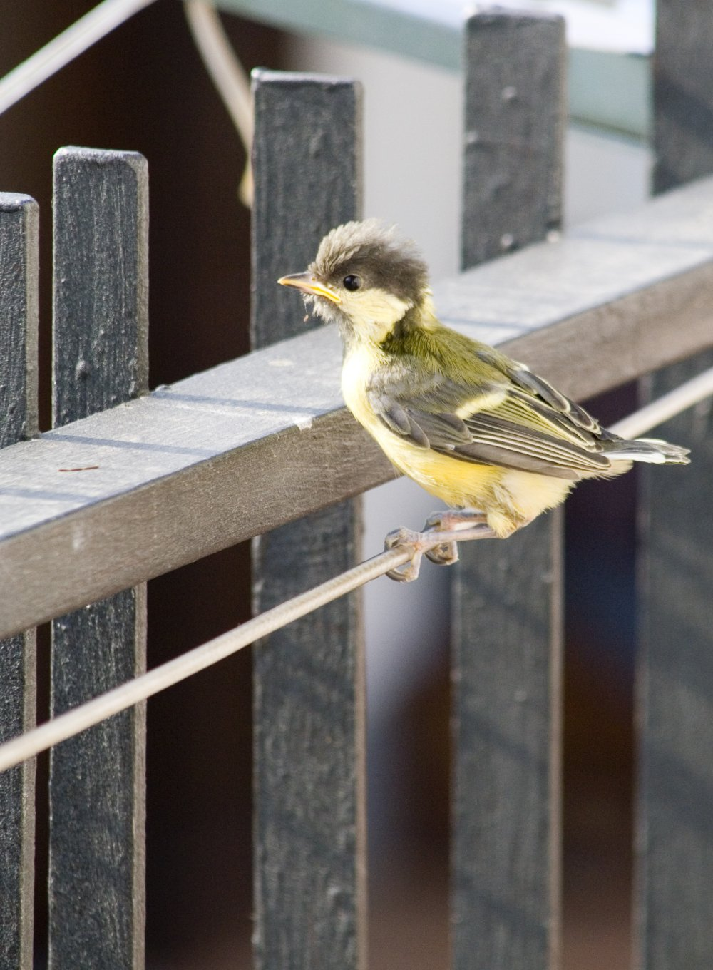 Cinciallegra al suo primo volo dal balcone